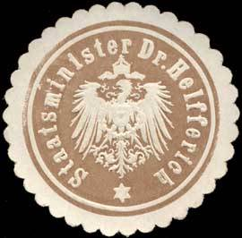 Sealing stamp Title: Staatsminister Dr. Helfferich Description: hellbraun, weiß, geprägt Place: size: 4 cm